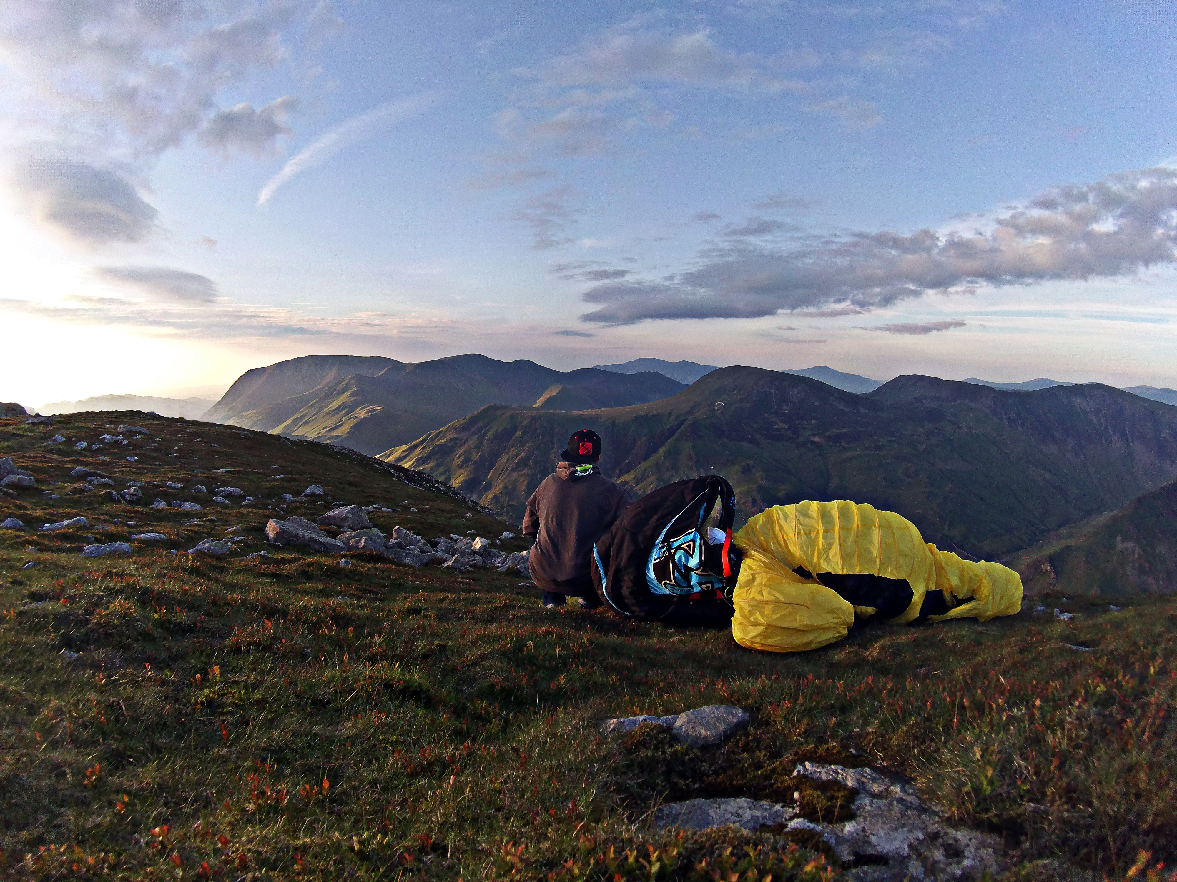 Théo de Blic seul sur un sommet en Angleterre